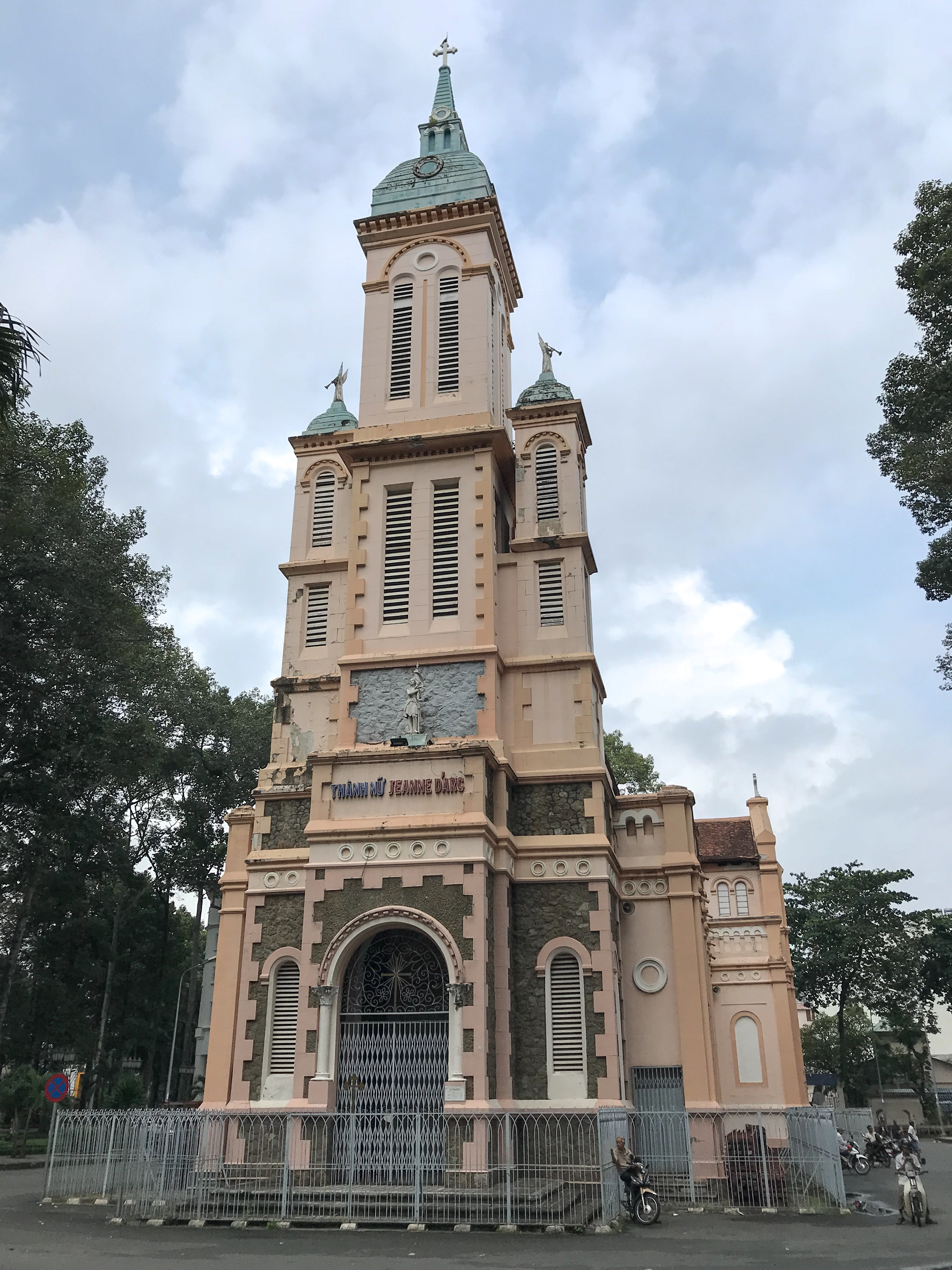 中文（中国大陆）: 六岔圣女贞德教堂 胡志明市第五郡